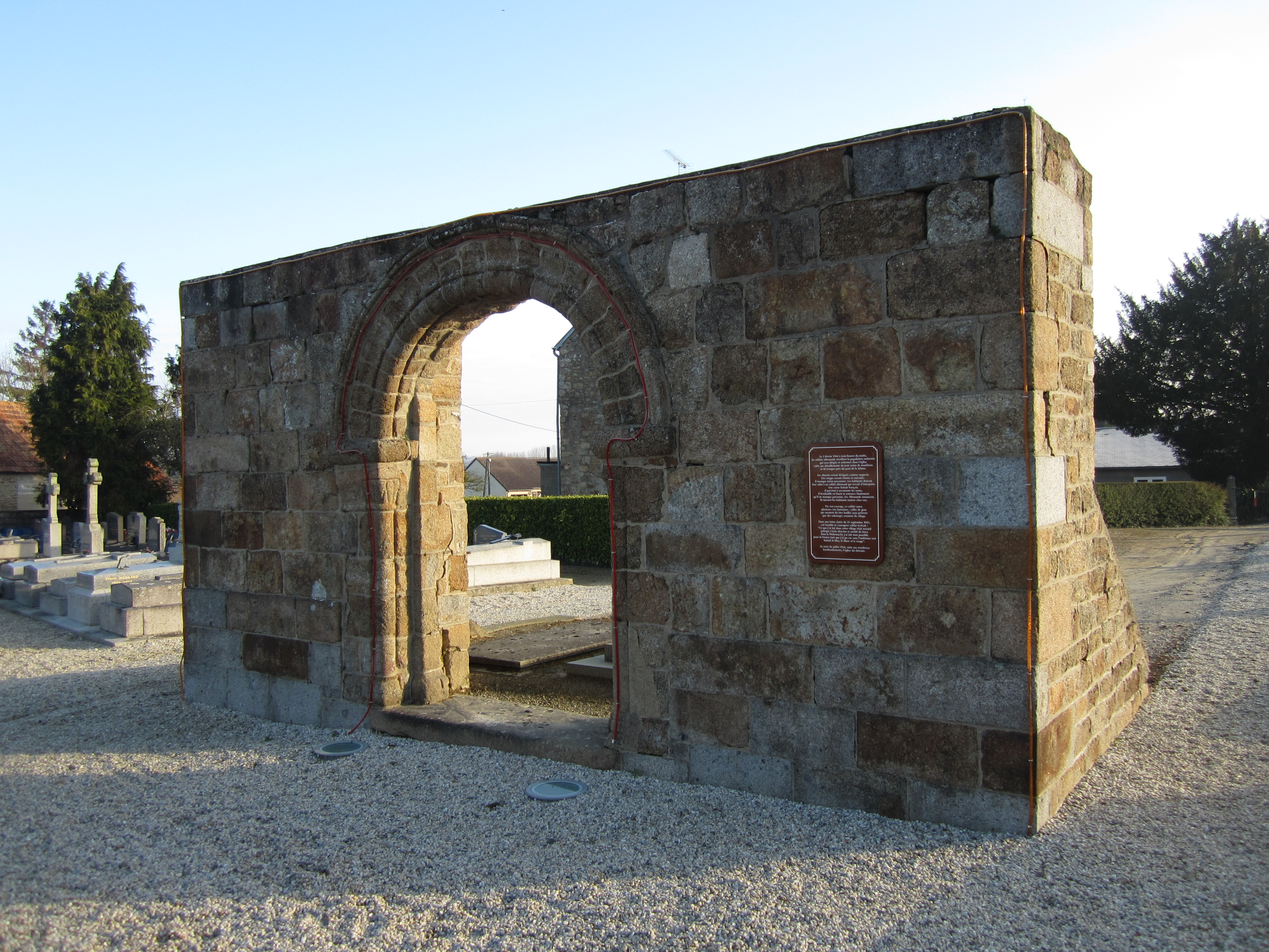 Pontaubault